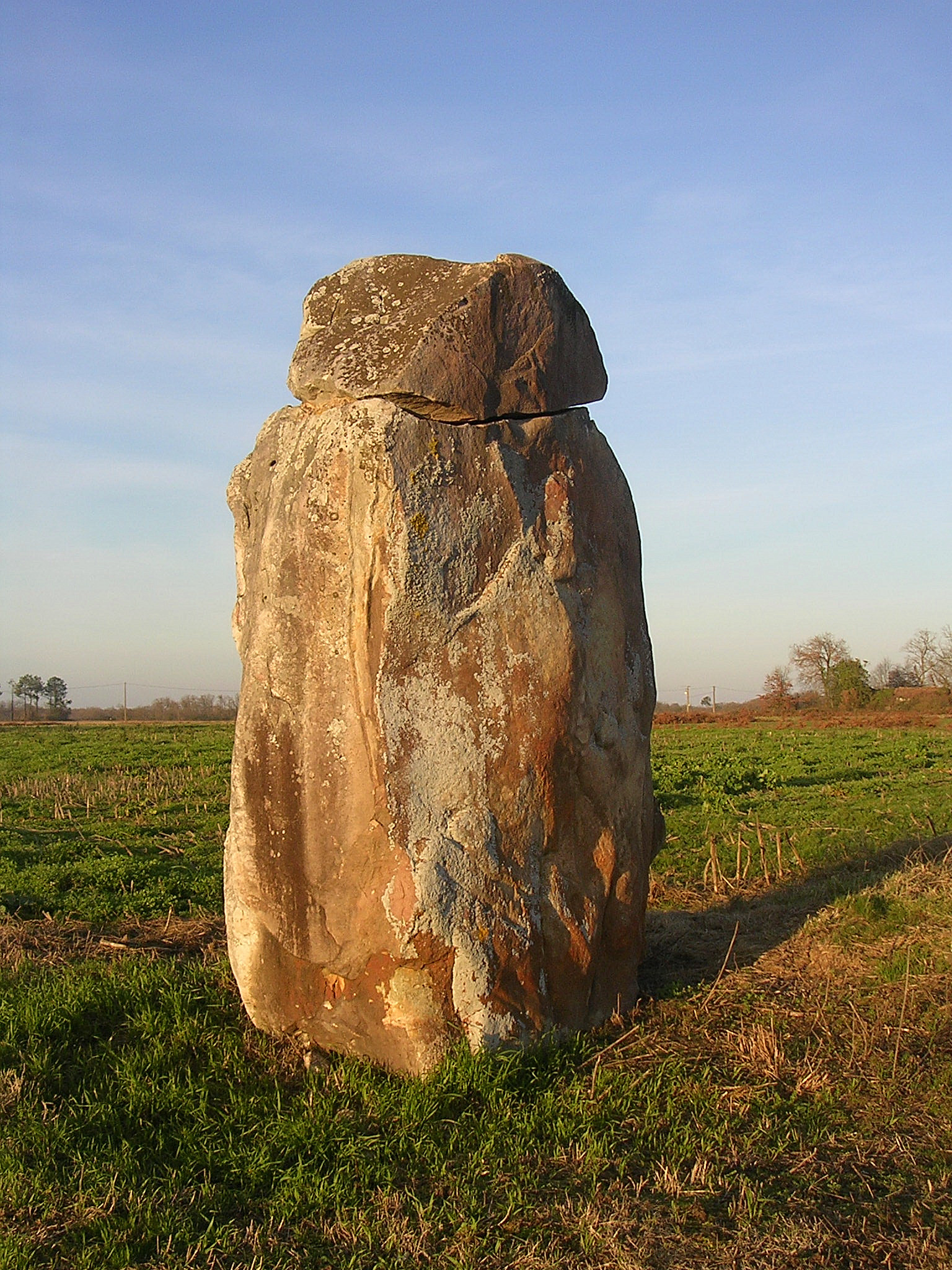 Mégalithe de Guillay, à Larrivière-Saint-Savin (Landes, France)